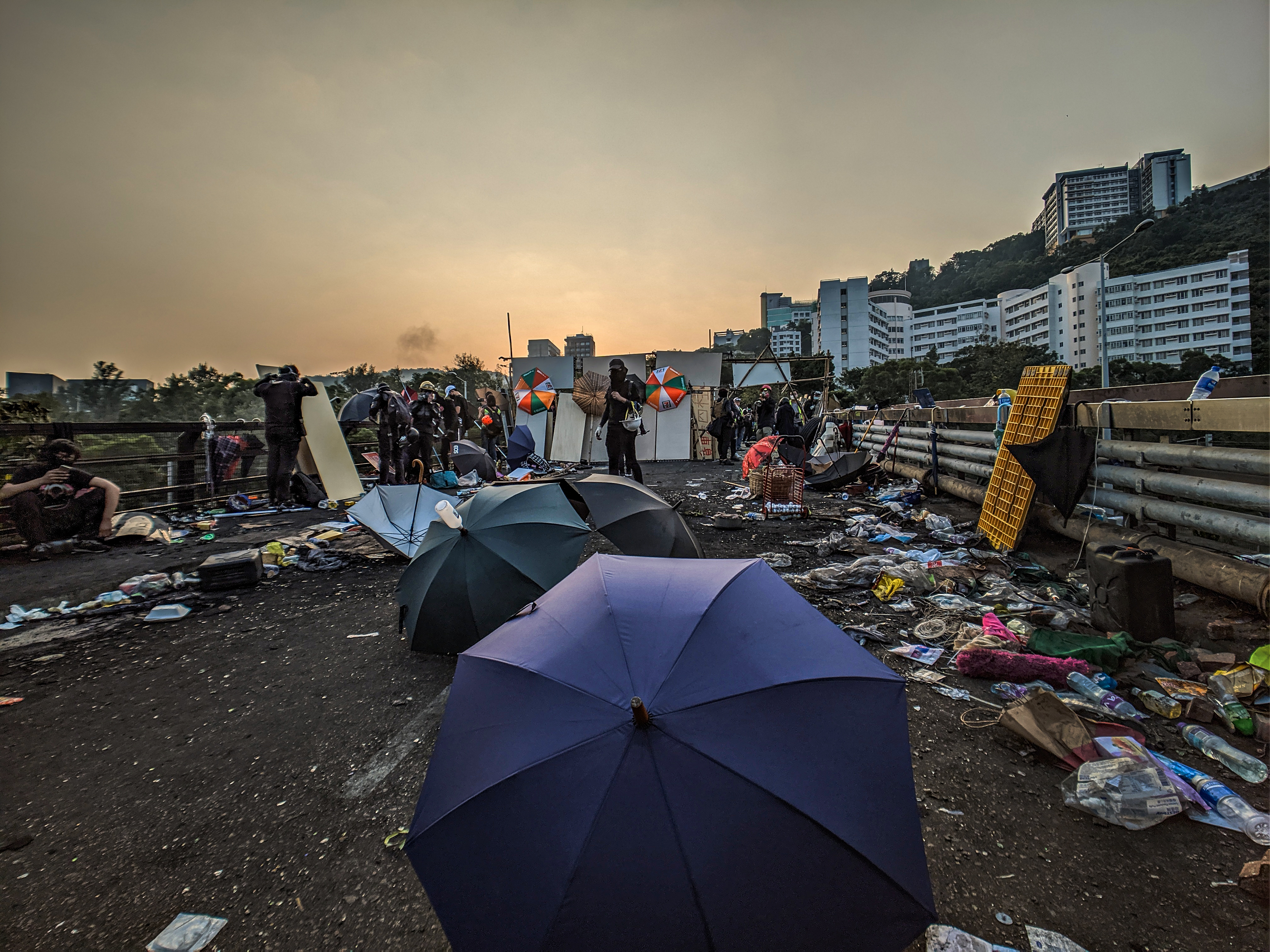 IMG_20191113_170307